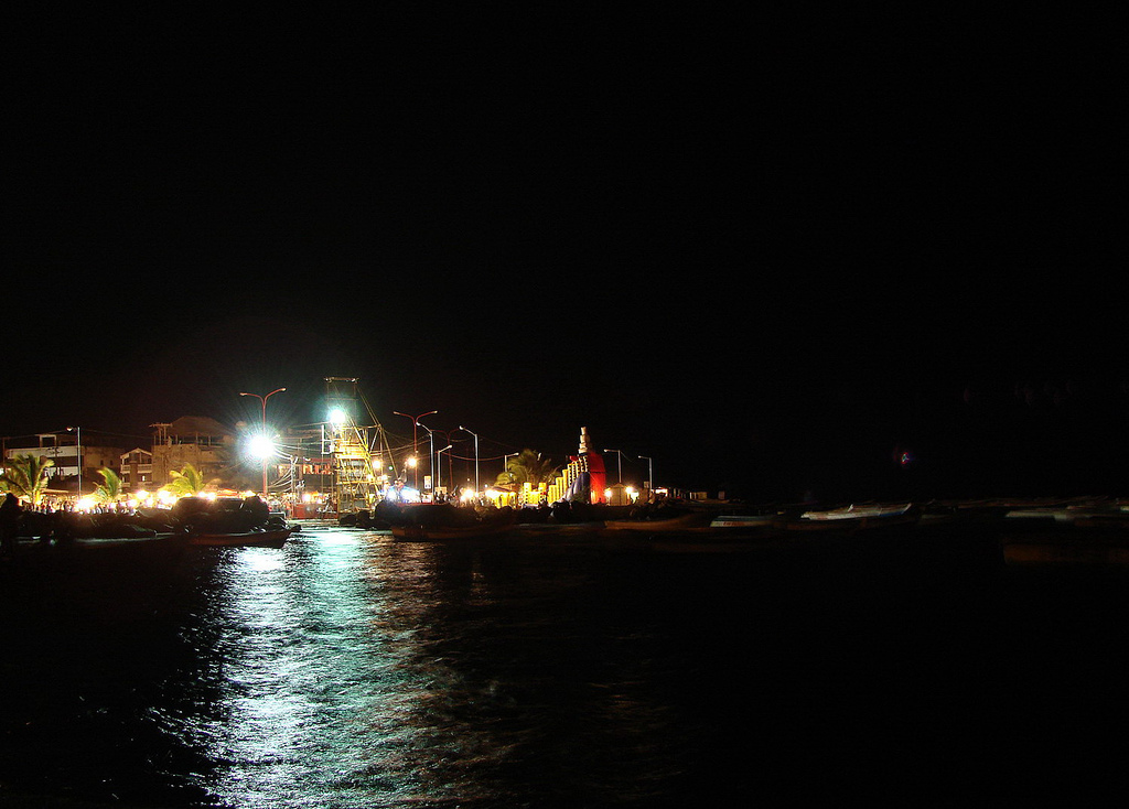 ...a lo lejos la algarabía, aquí el silencio, la compañía la brisa marina